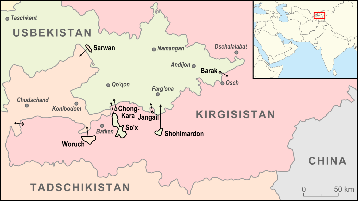 Die tadschikischen Exklaven Sarwan und Woruch; die kirgisische Exklave Barak, sowie die usbekischen Exklaven Chong-Kara, Dzhangail, Shohimardon, So'x und Tayan